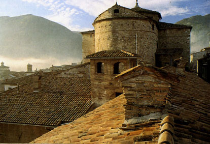 Cagli: scorcio della concattedrale di S. Maria Assunta.